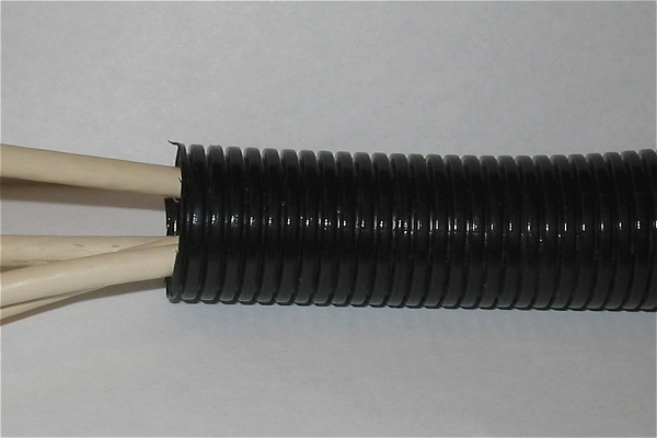 Leerrohr mit Kabeln